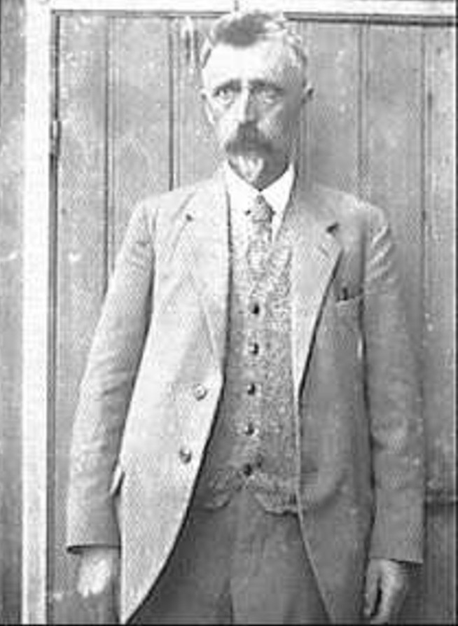 Klaas Uilkema: Klaas Uilkema (opmerking: Deze afbeelding hebben wij helaas alleen in deze lage resolutie.)